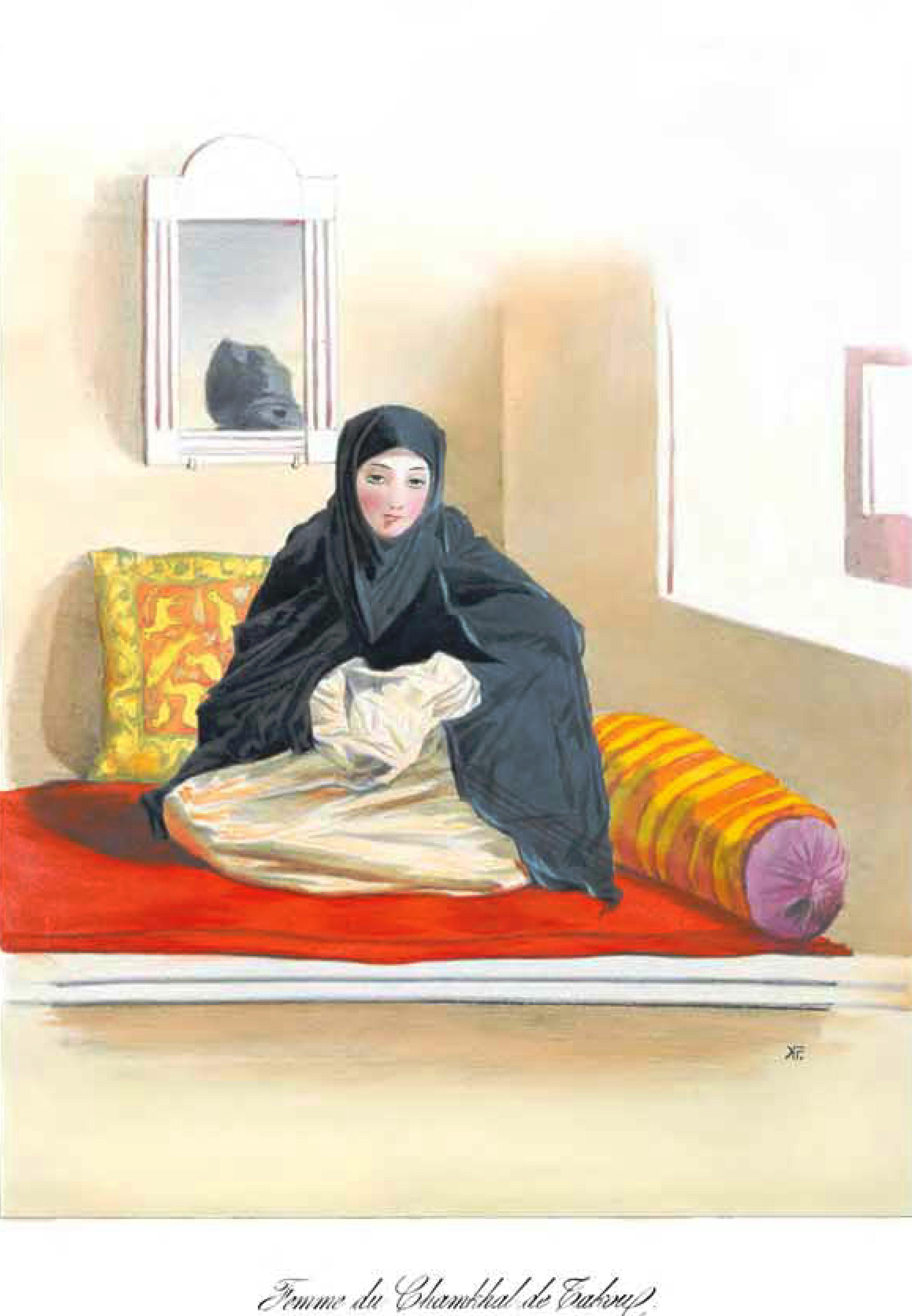 Scènes, paysages, moeurs et costumes du Caucase dessinés d'aprés nature par le prince G. Gagarine.